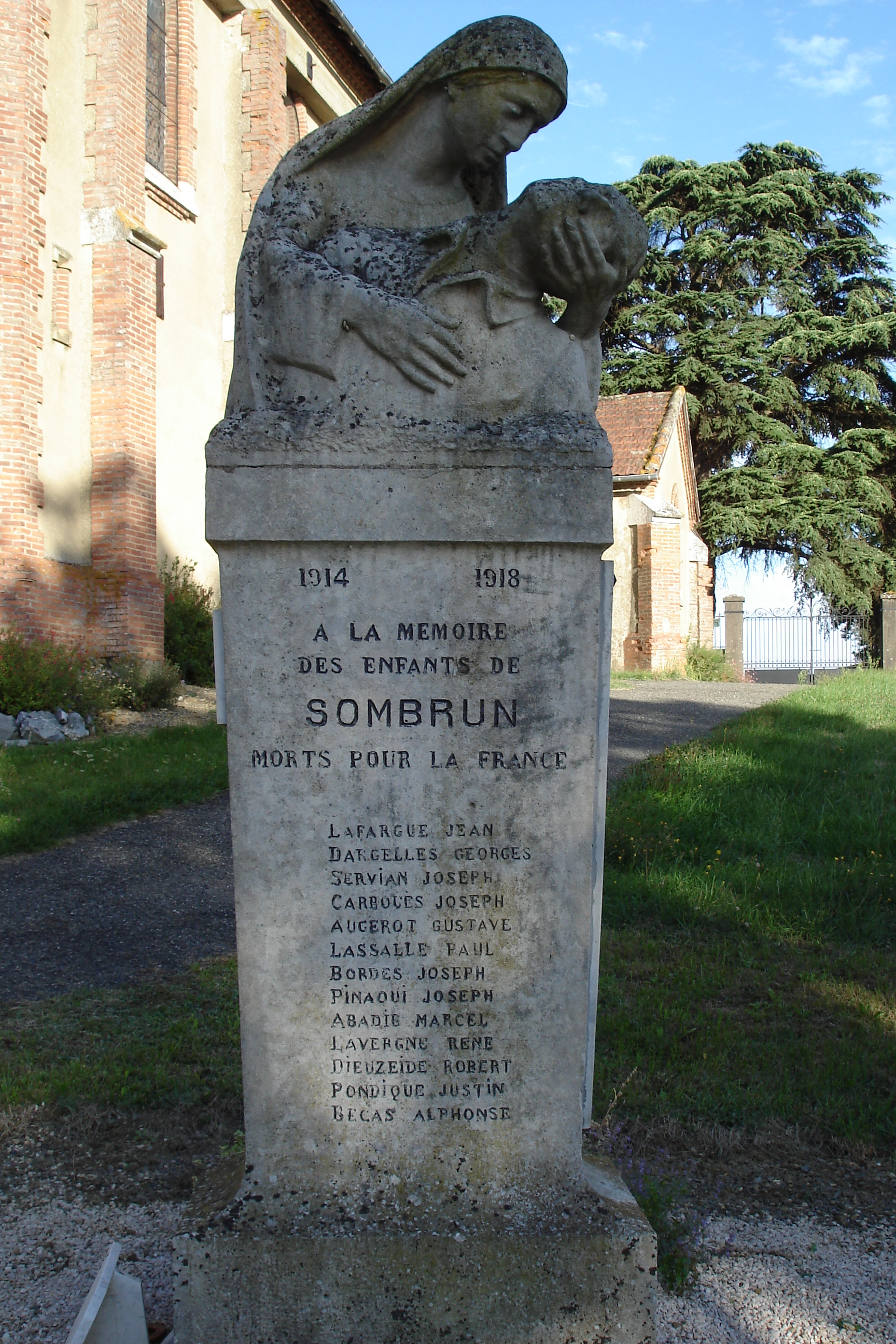 Monument aux Morts de Sombrun. Sombrun. Hautes-Pyrénées . France.